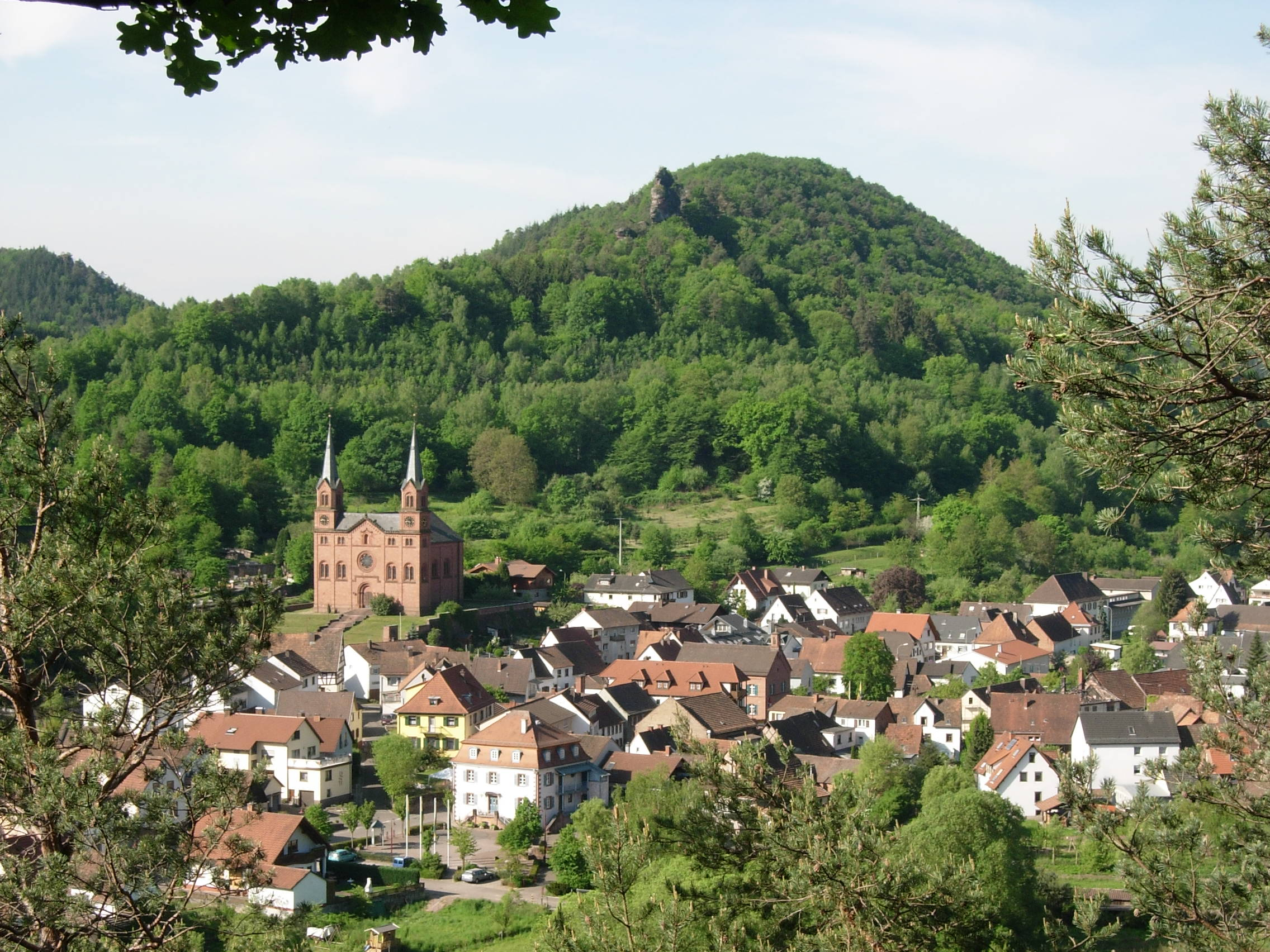 Wilgartswiesen